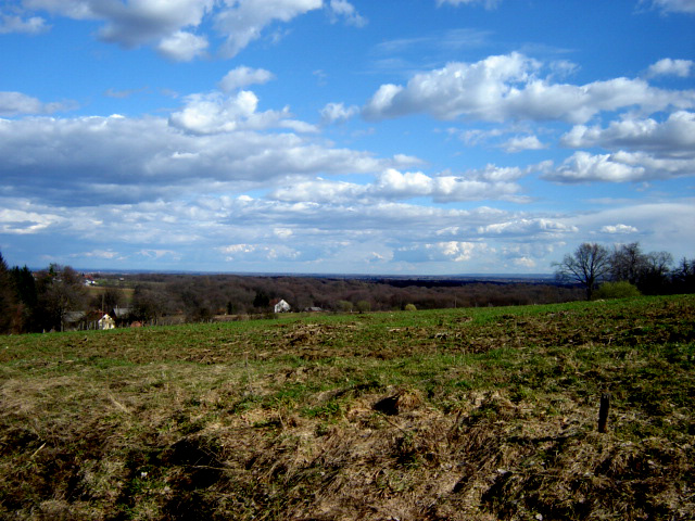 Pogled sa vrha SJnb